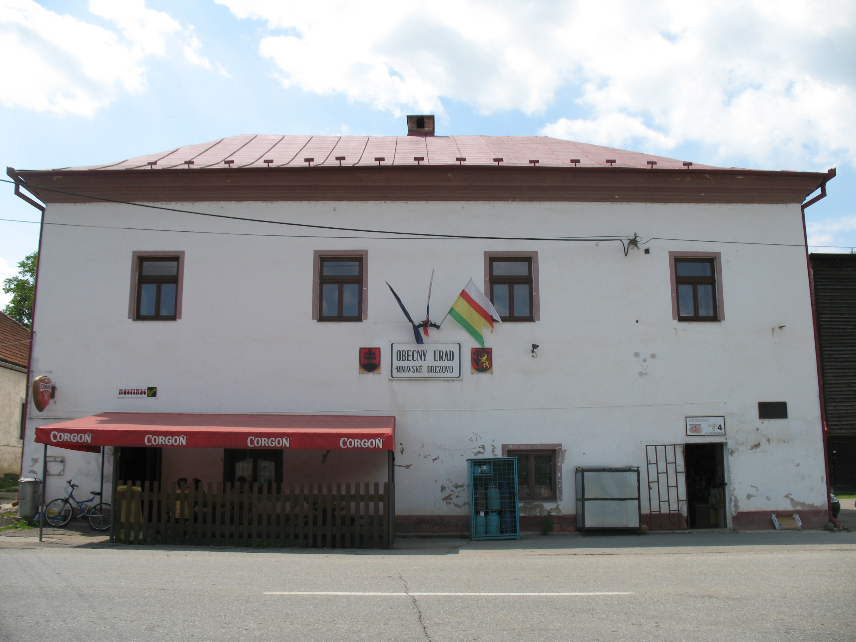 Rimabrézó